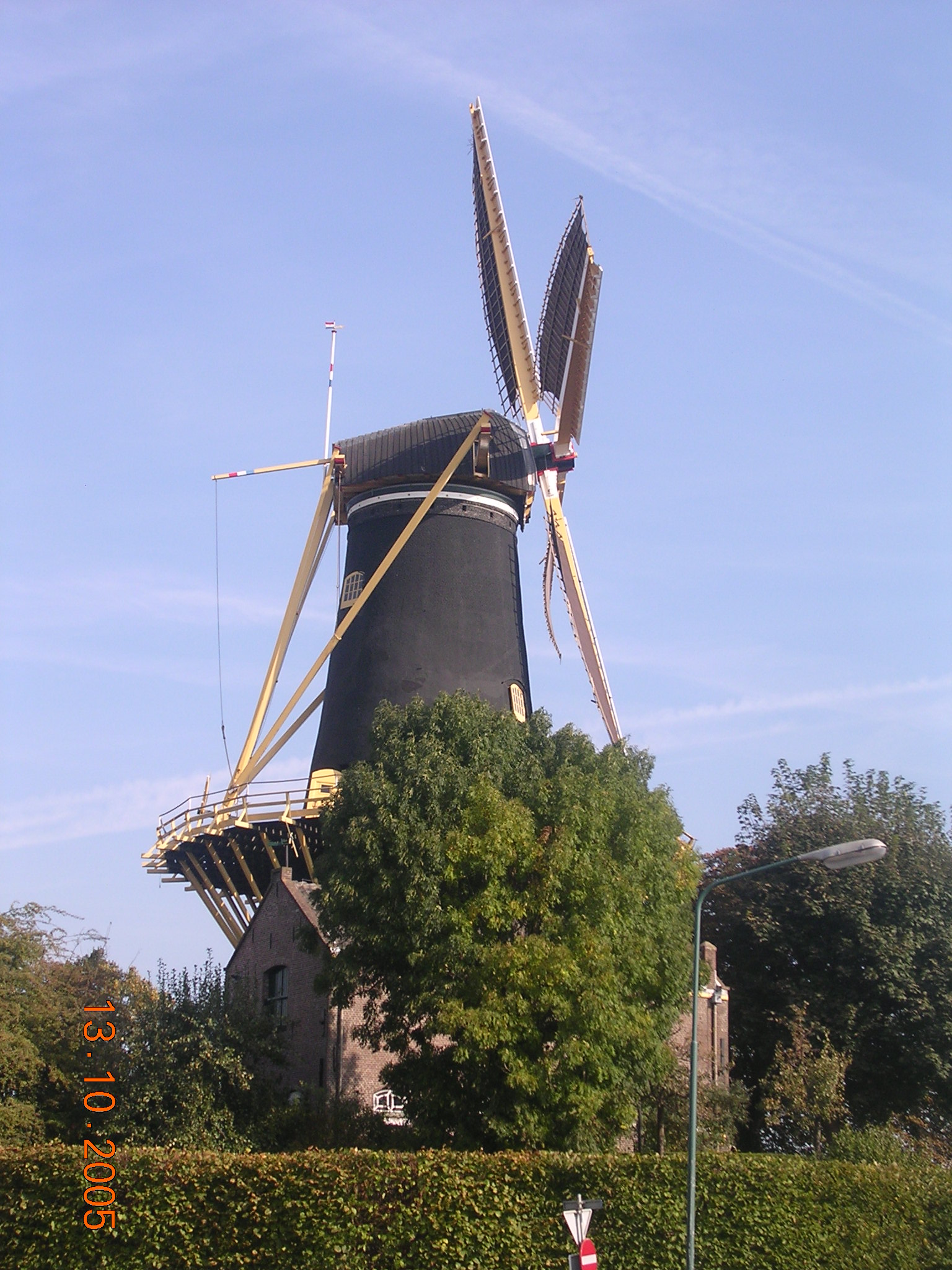 Zelfgemaakte foto van de Windhond, de molen in het centrum van Woerden. Foto gemaakt op donderdag 13 oktober 2005. Het was mooi weer, de molen werkte, maar stond helaas met de wieken in de richting van de singel/het station, zodat het moeilijk was een mooie foto te maken: ik moest teveel onder de helling van de molen staan, of helemaal tussen de huizen. Hopelijk maak ik nog eens een mooiere foto vanaf de Kruittorenweg.